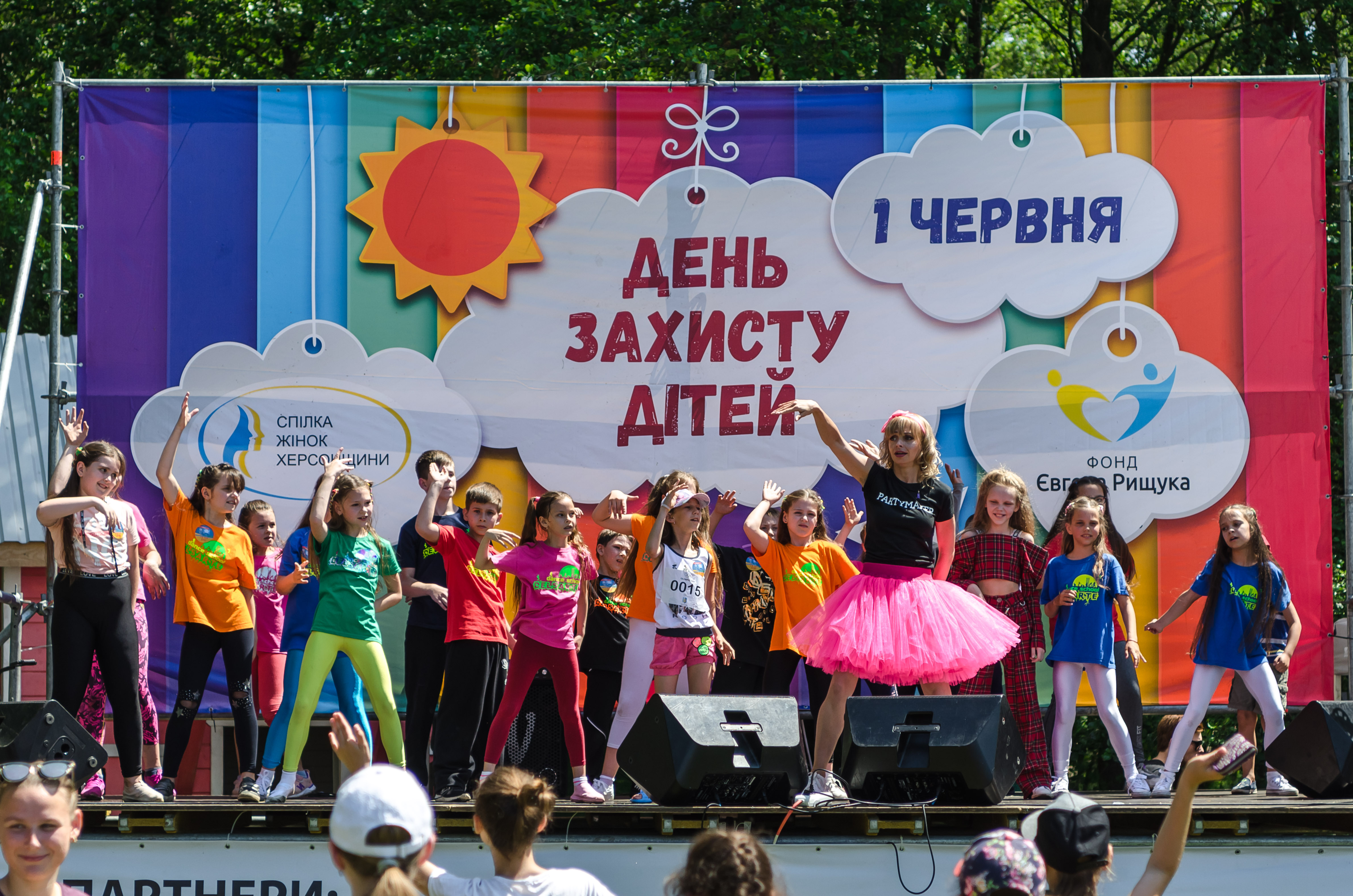 1 червня